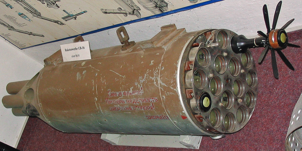 Beschreibung: Rohrstartbehälter UB-16 Fotograf: Darkone, 15. Mai 2005